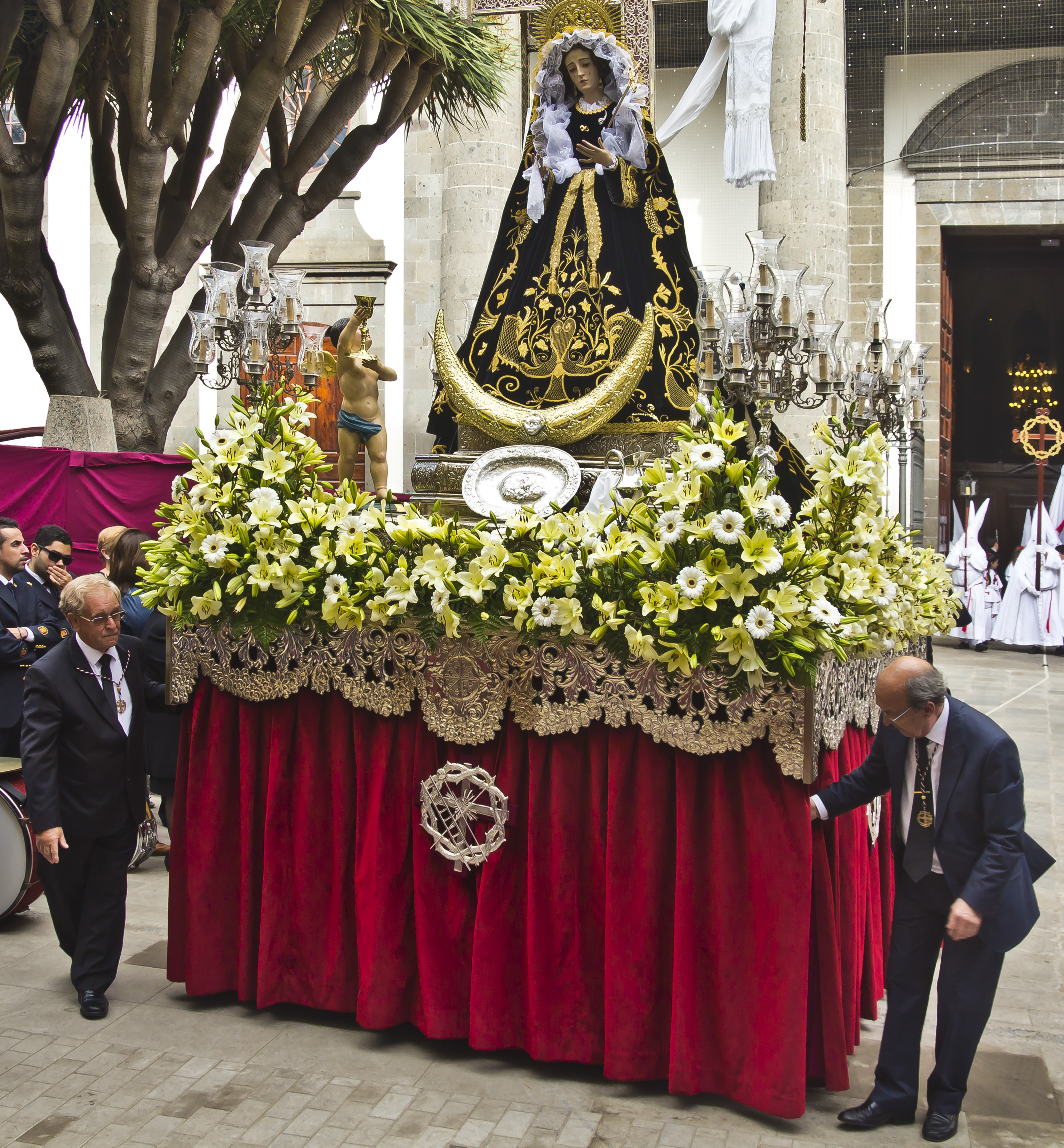 Paso de la Soledad de María Santísima